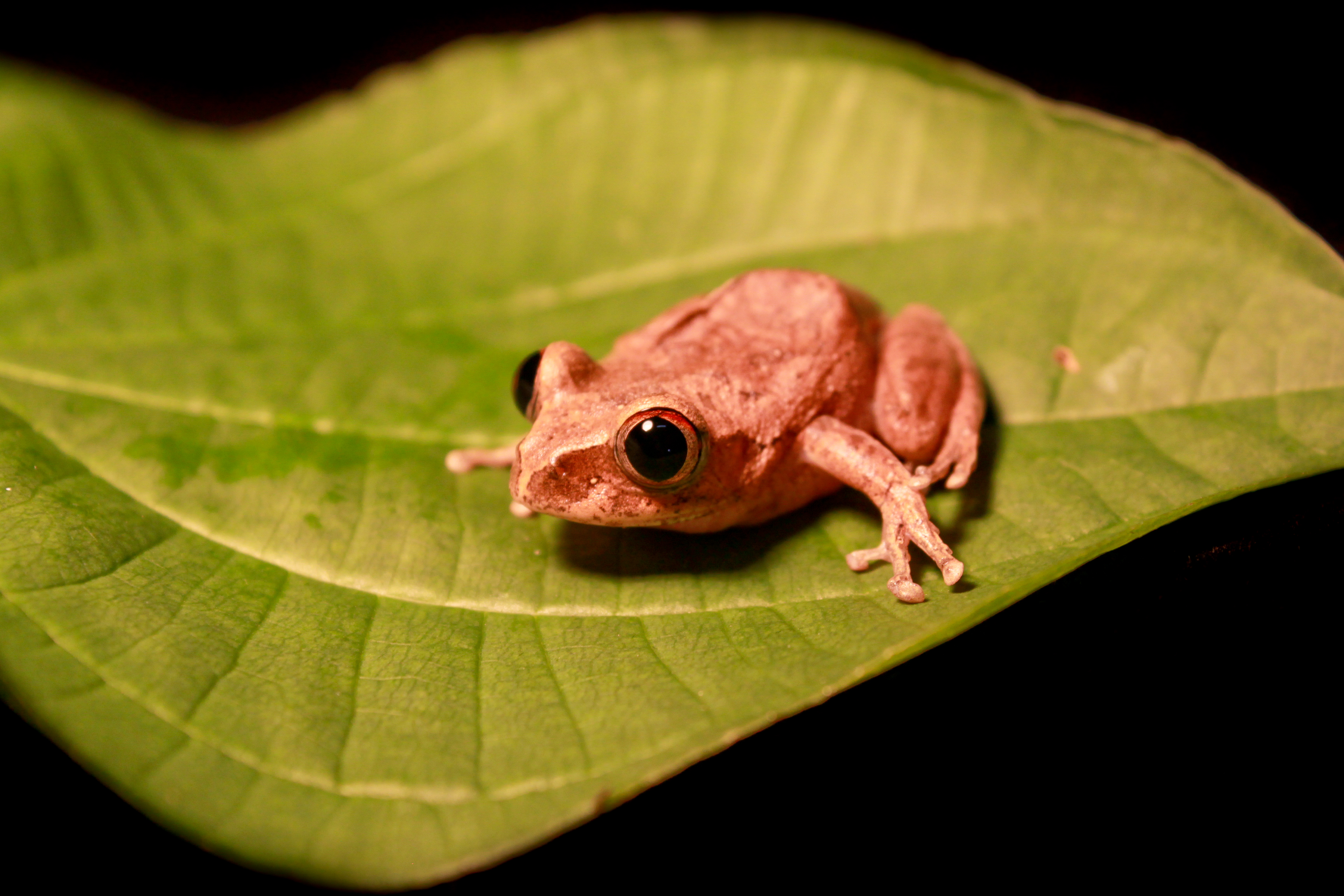 Leptopelis aubryi, Libreville, Gabon.